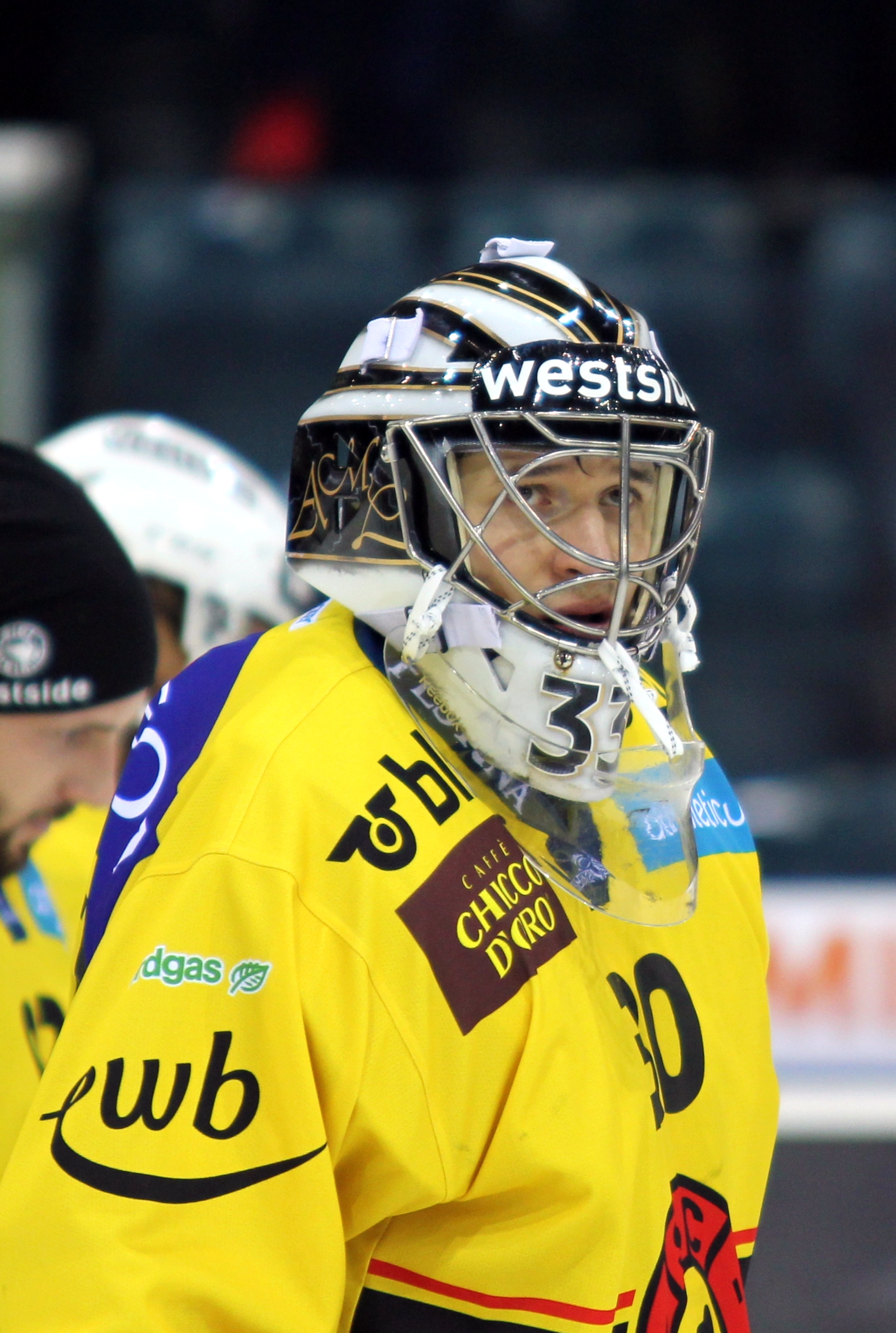 Jakub Štěpánek (B 30).